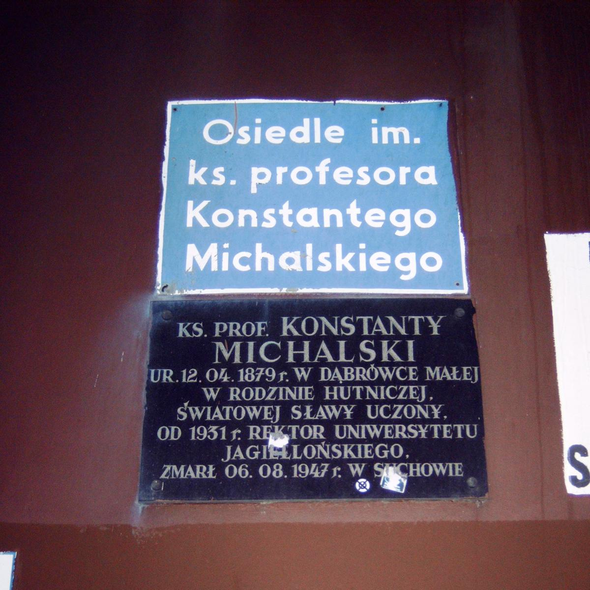 Tablica pamiątkowa na Osiedlu Michalskiego w Dąbrówce Małej (Katowice)